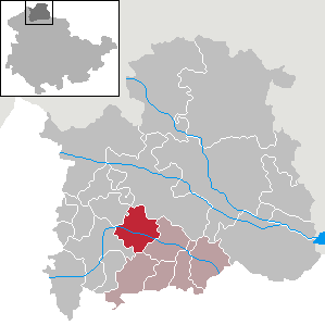 Gemeinde Wipperdorf in Thüringen, Landkreis Nordhausen